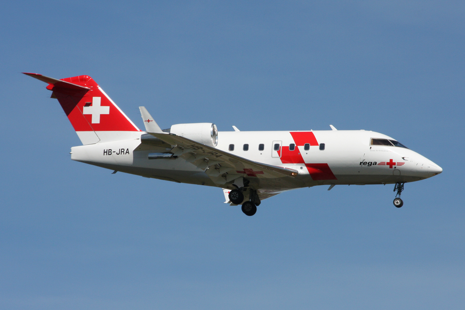 Zürich (- Kloten) (ZRH / LSZH) Switzerland 4.2013